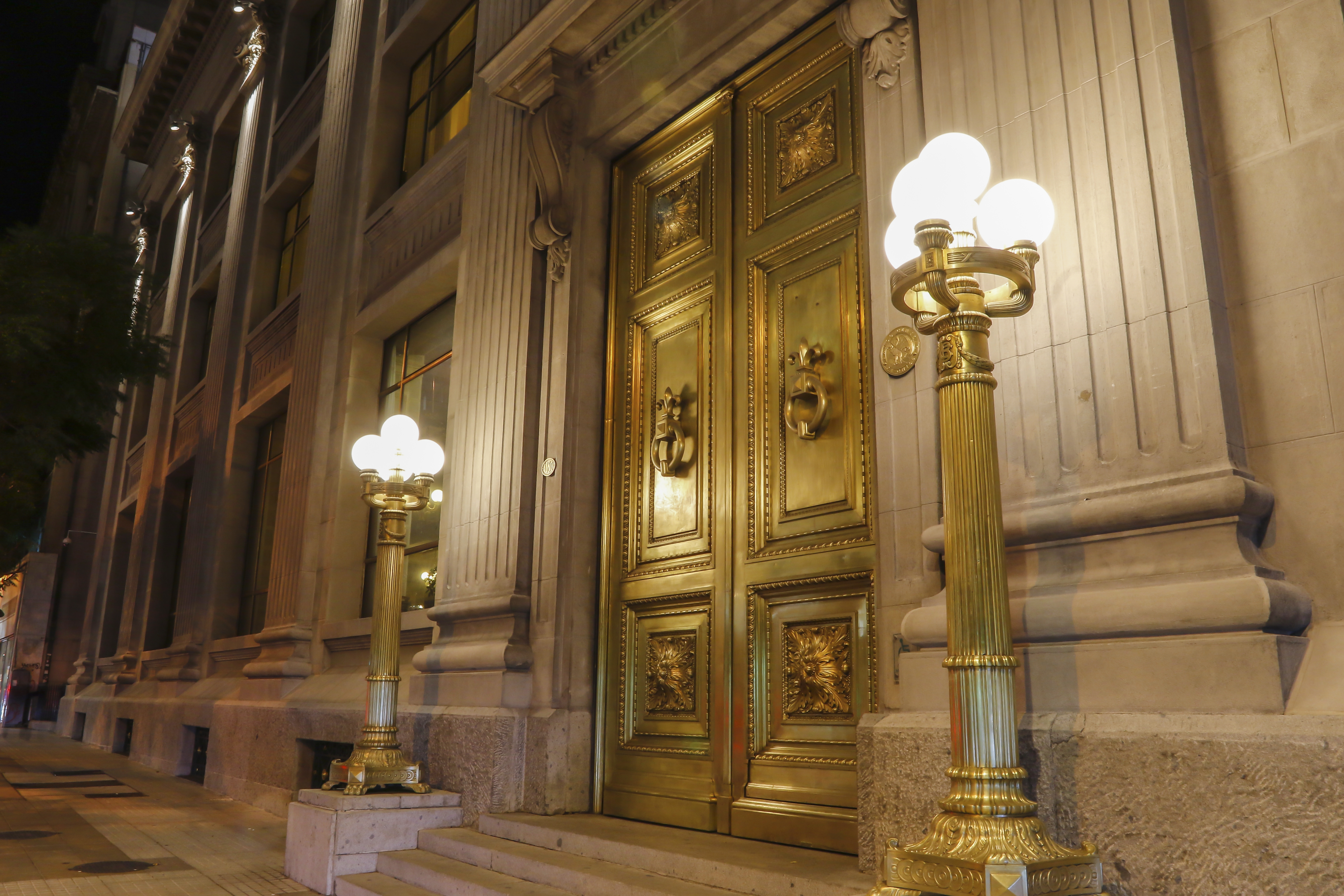 El Presidente del Banco Central de Chile, Mario Marcel, encabezó la ceremonia de inauguración de las obras de restauración de la fachada del edificio institucional del instituto emisor iniciadas en octubre de 2016 y que fueron las más relevantes realizadas desde los años 40 del siglo pasado. Estas labores, que se extendieron por 16 meses, devolvieron a la fachada los detalles originales que fueron sufriendo daños propios del paso del tiempo y de los frecuentes sismos. Como coincidencia, el edificio del Banco Central está cumpliendo 90 años desde su construcción, obra del arquitecto Alberto Cruz Montt.